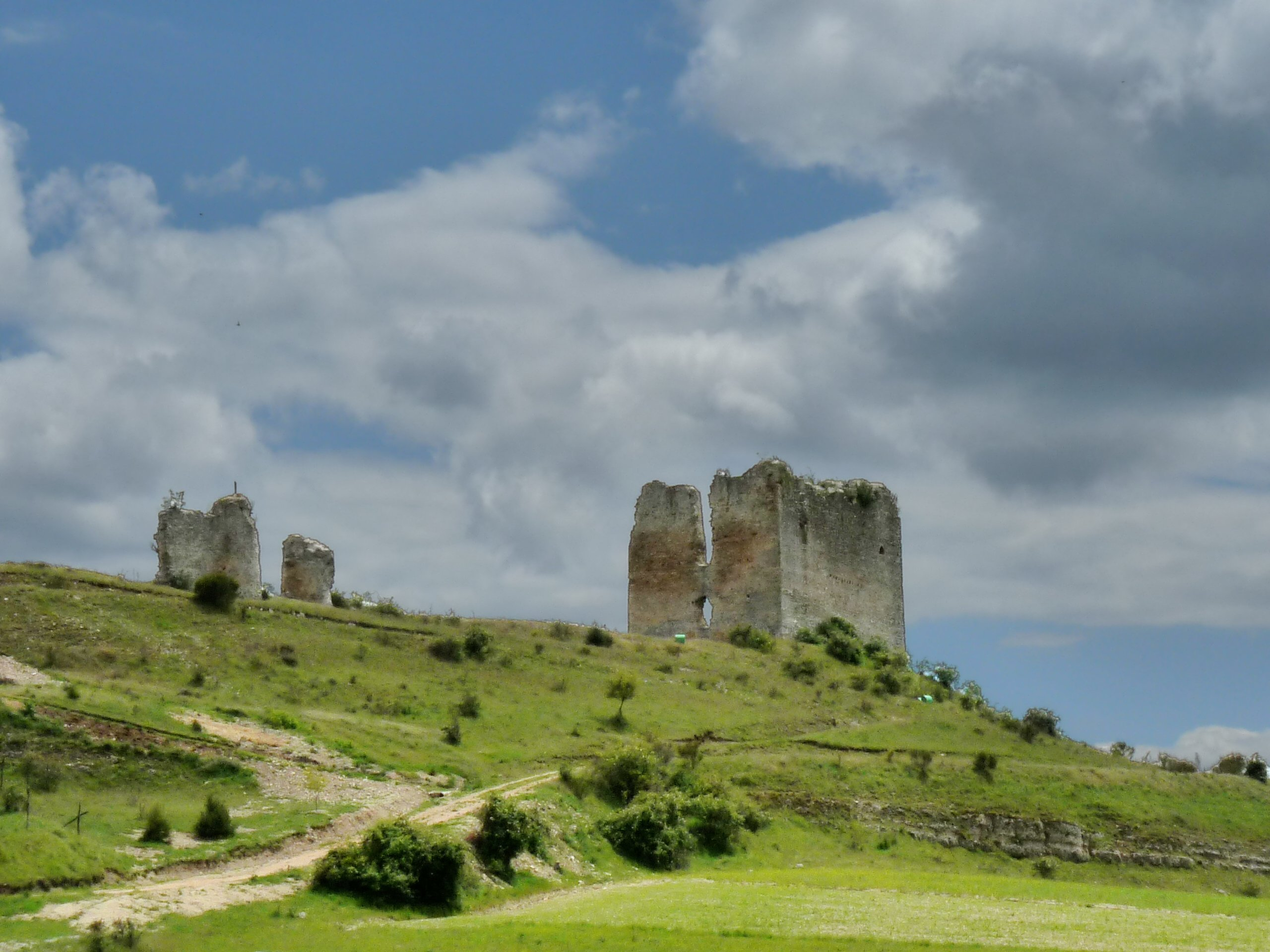 Cabrejas del Pinar - Castillo